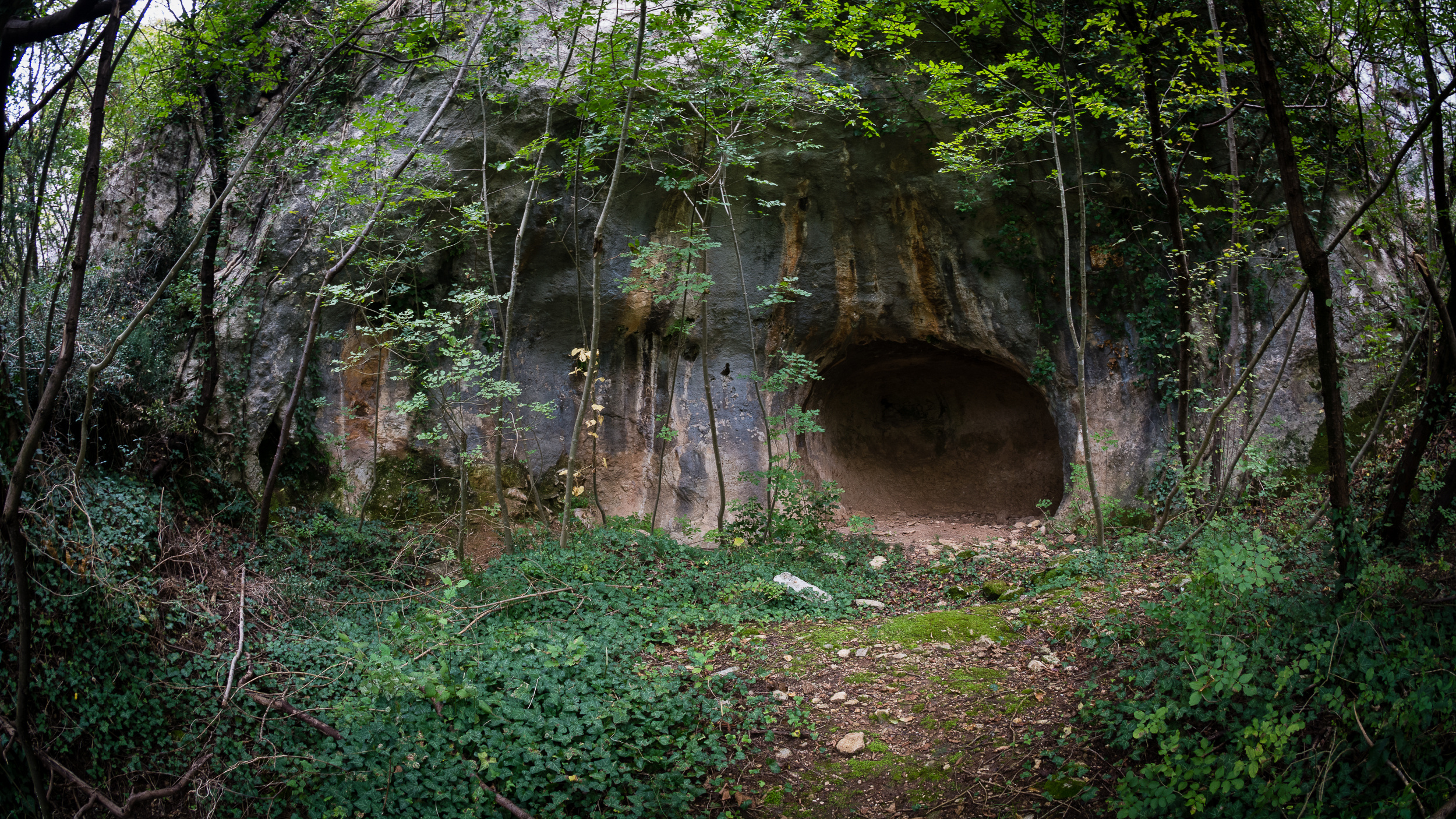 Der Abri Mezzena (Riparo Mezzena) bei Avesa, Venetien, Italien. Siehe auch